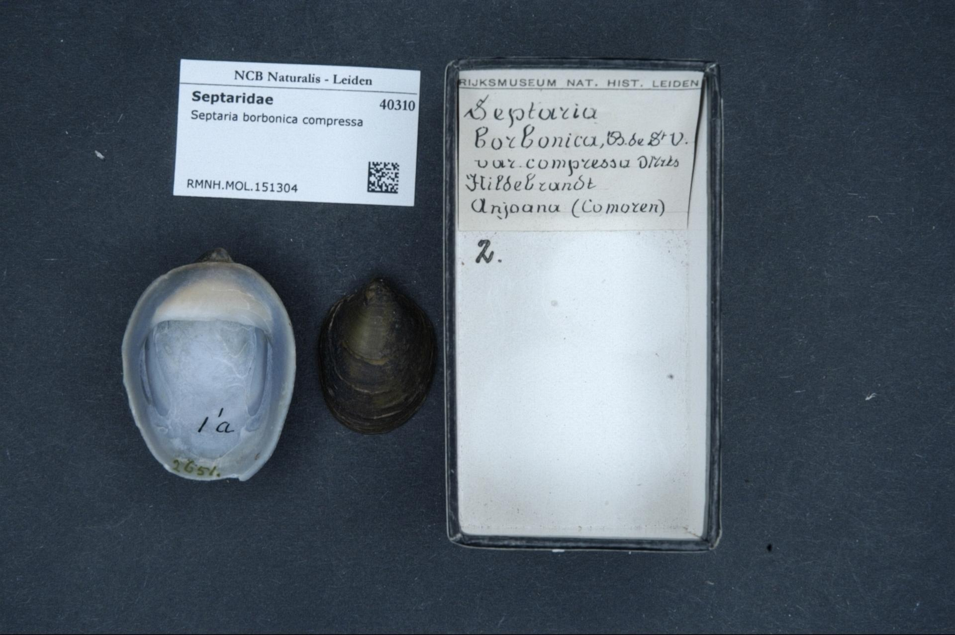 Navicella borbonica compressa Von Martens, 1881